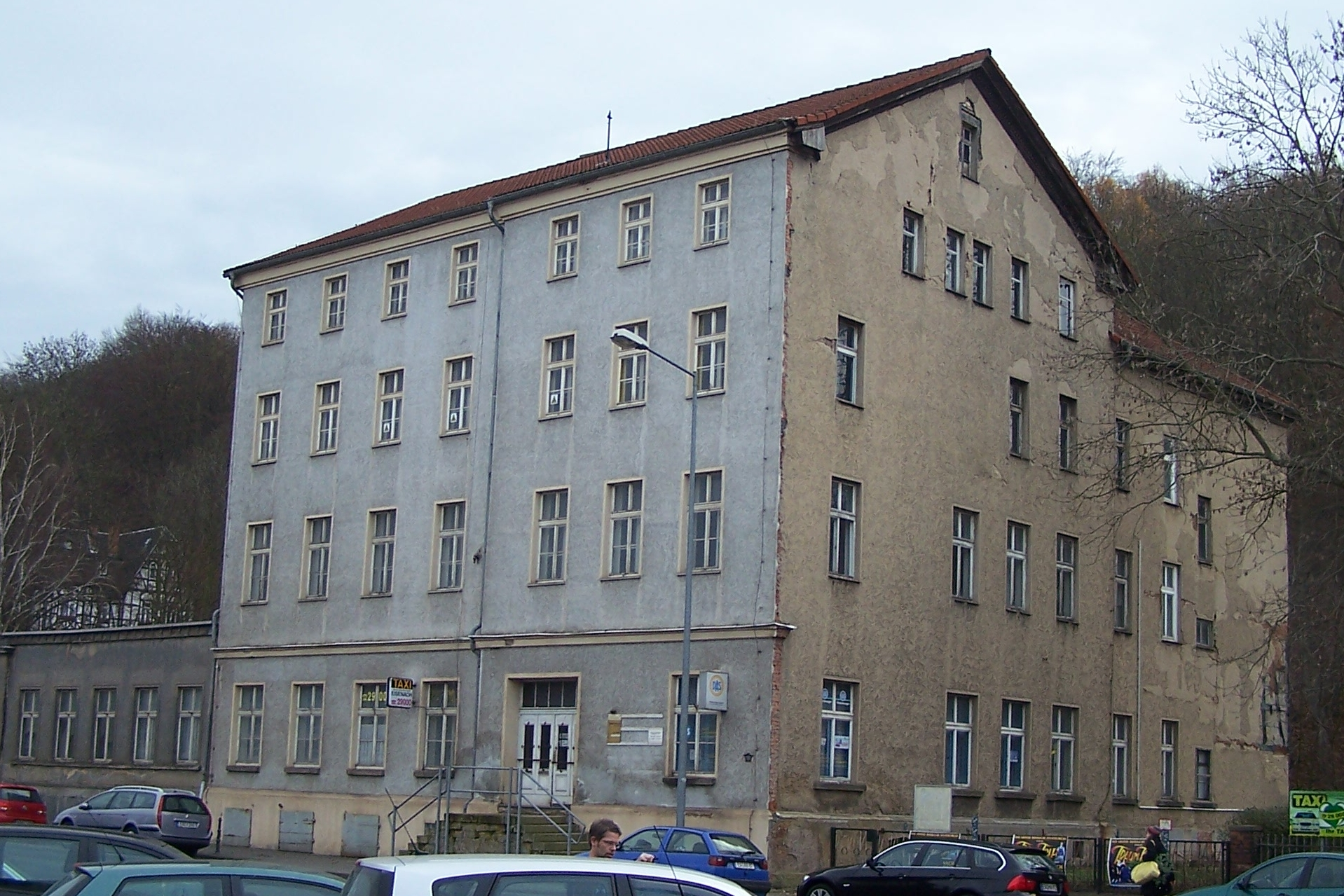 Schrägansicht des Hauses vom Eingang zum Hauptbahnhof in Eisenach.